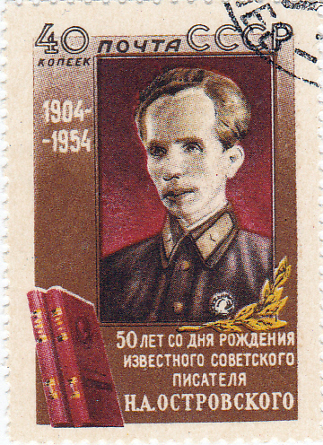 timbre soviétique commémorant le 50ème anniversaire de la naissance de Nicolaï Ostrovski